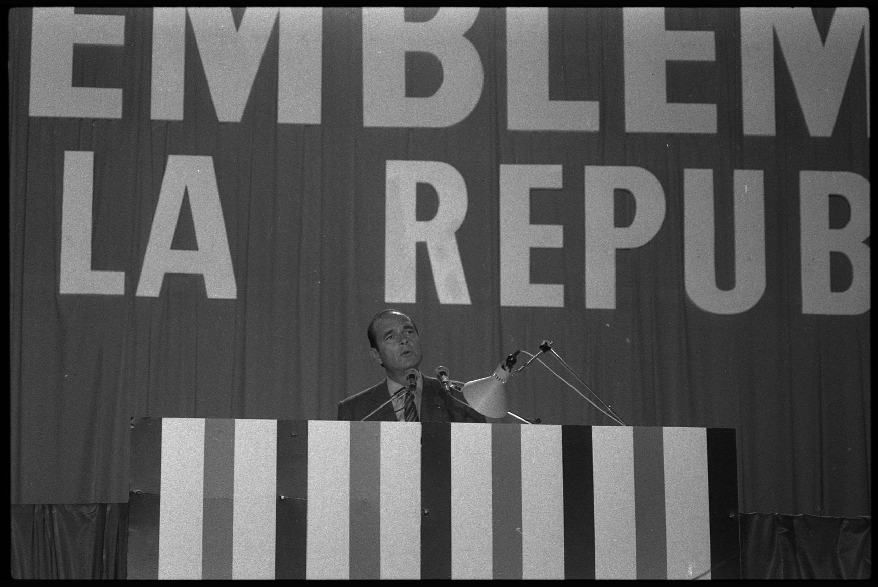 Toulouse (Haute-Garonne). 24 Janvier 1982. Vue du meeting de Jacques Chirac lors des assisies du RPR à Toulouse.